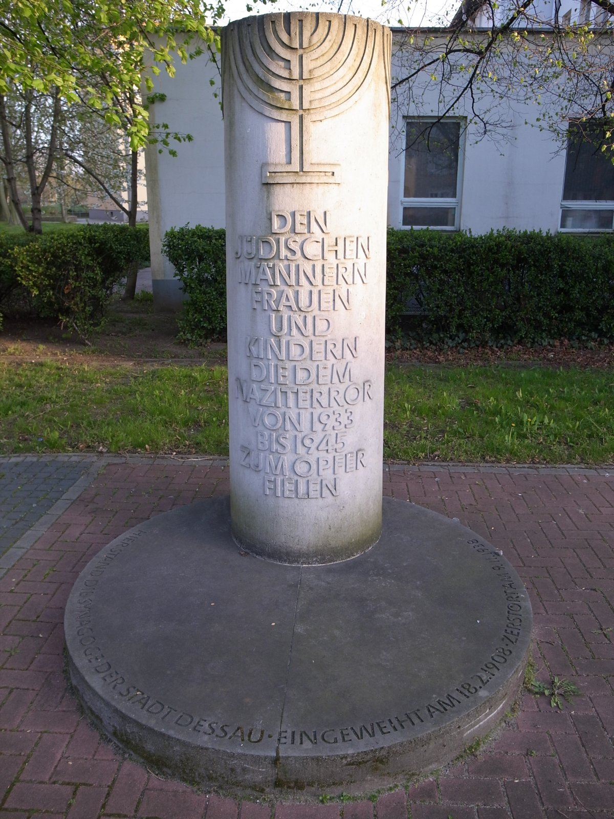 Dessau-Roßlau, Gedenkstelle auf dem ehemaligen Synagogengelände